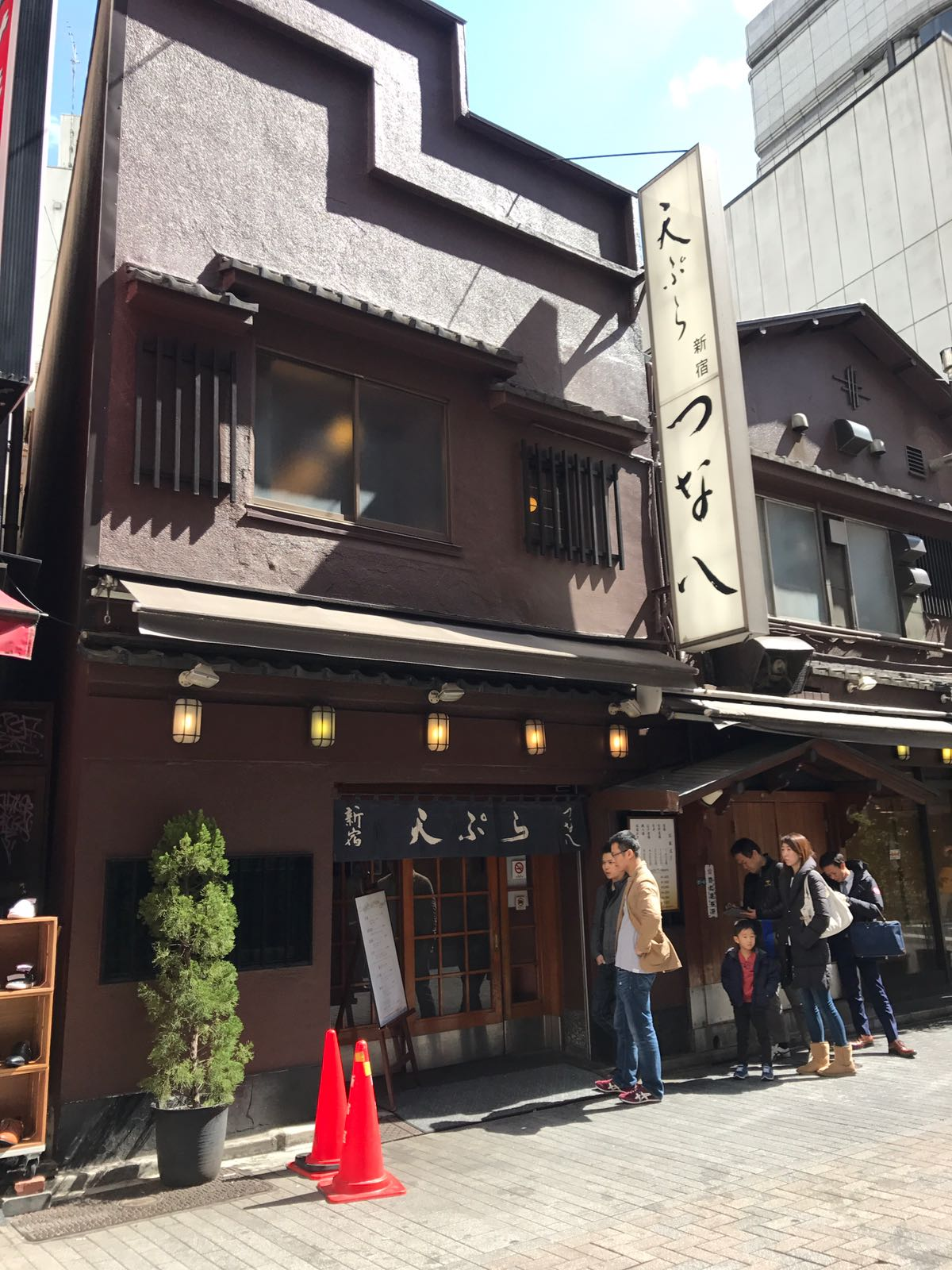 中文（香港）: 新宿天婦羅綱八外觀